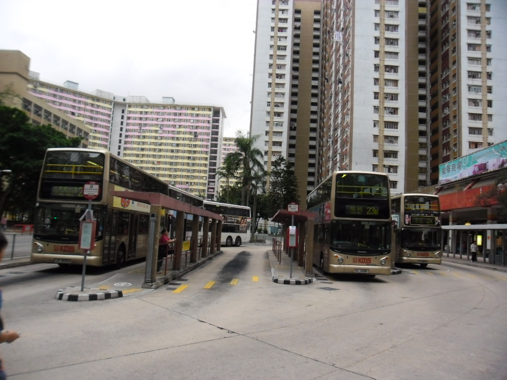 中文（香港）: 樂華巴士總站(2013年3月)